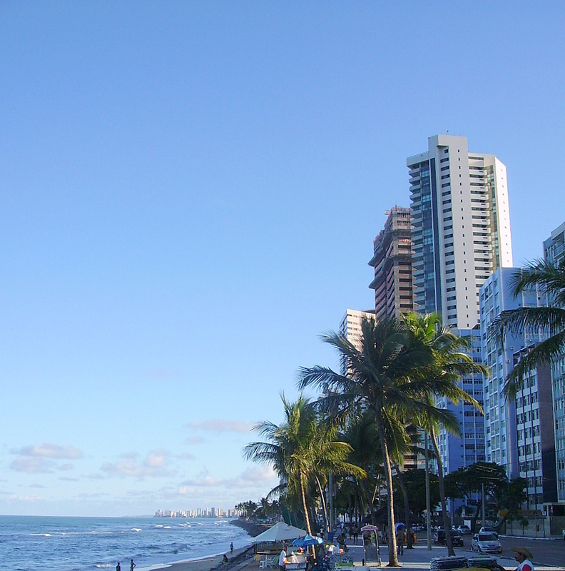 Praia Boa Viagem-Recife-PE-Brazil